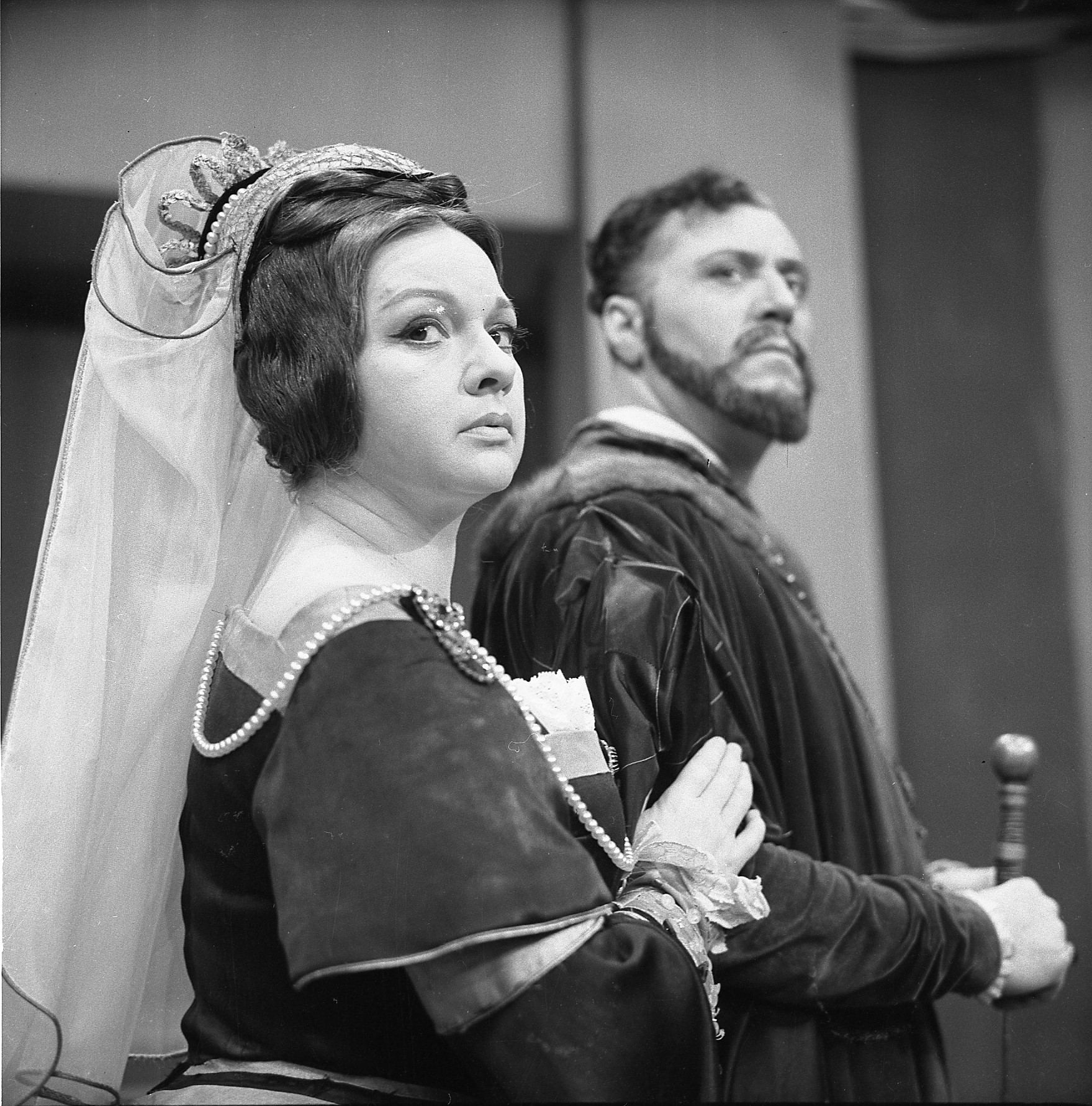 Olga Spiridonović i Mladja Veselinović, Tv film Romeo i Julija, 1963.foto Stevan Kragujević (po odobrenju Tanje Kragujević)